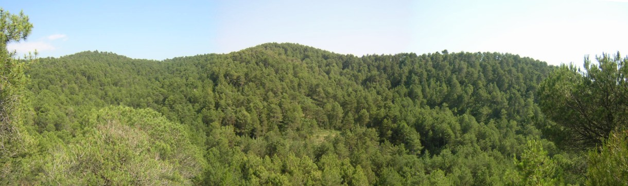 El Bosc Mitger (Castellcir i Monistrol de Calders, Moianès)